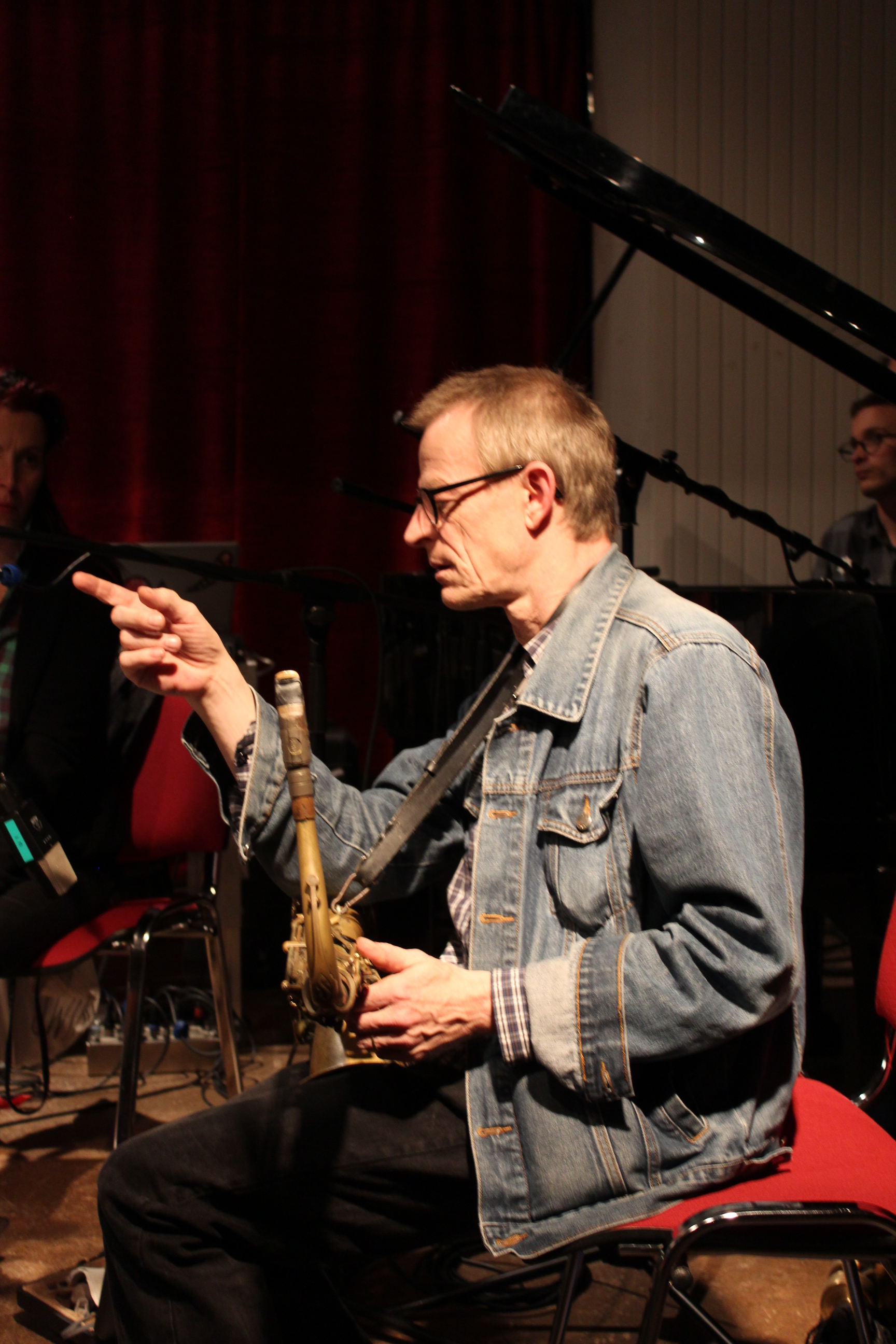 Mattias Schubert auf dem SWR NEWJazz Meeting: „hübsch acht“, mit Carl Ludwig Hübsch - tuba, compositions, Isabelle Duthoit – clarinet, Joris Rühl – clarinet, Matthias Schubert – tenorsax, Wolter Wierbos – trombone, Philip Zoubek – piano, Joker Nies – electronics